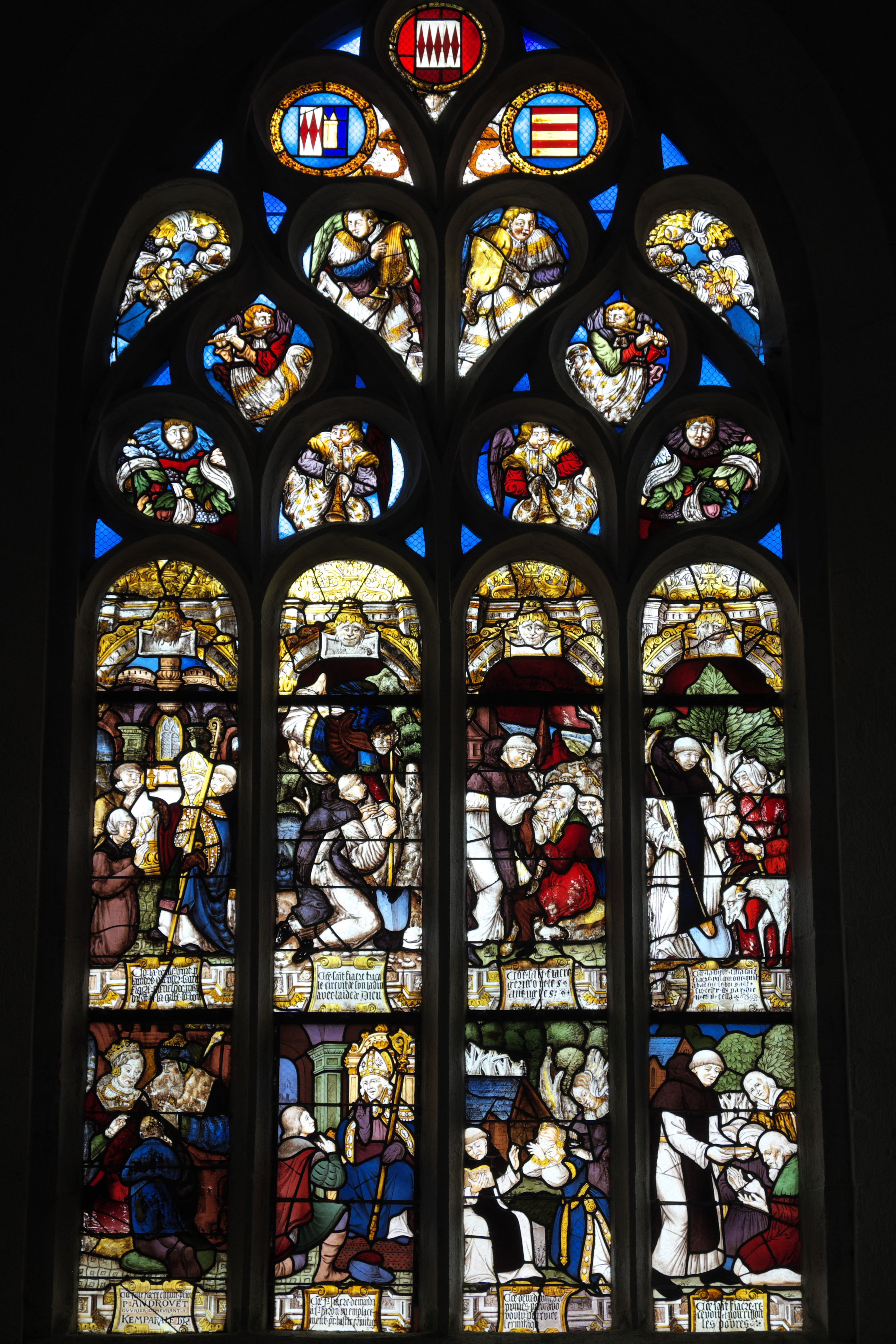 Kapelle Saint-Fiacre in Le Faouët im Département Morbihan (Region Bretagne/Frankreich), Bleiglasfenster Leben des heiligen Fiacrius aus der Mitte des 16. Jahrhunderts